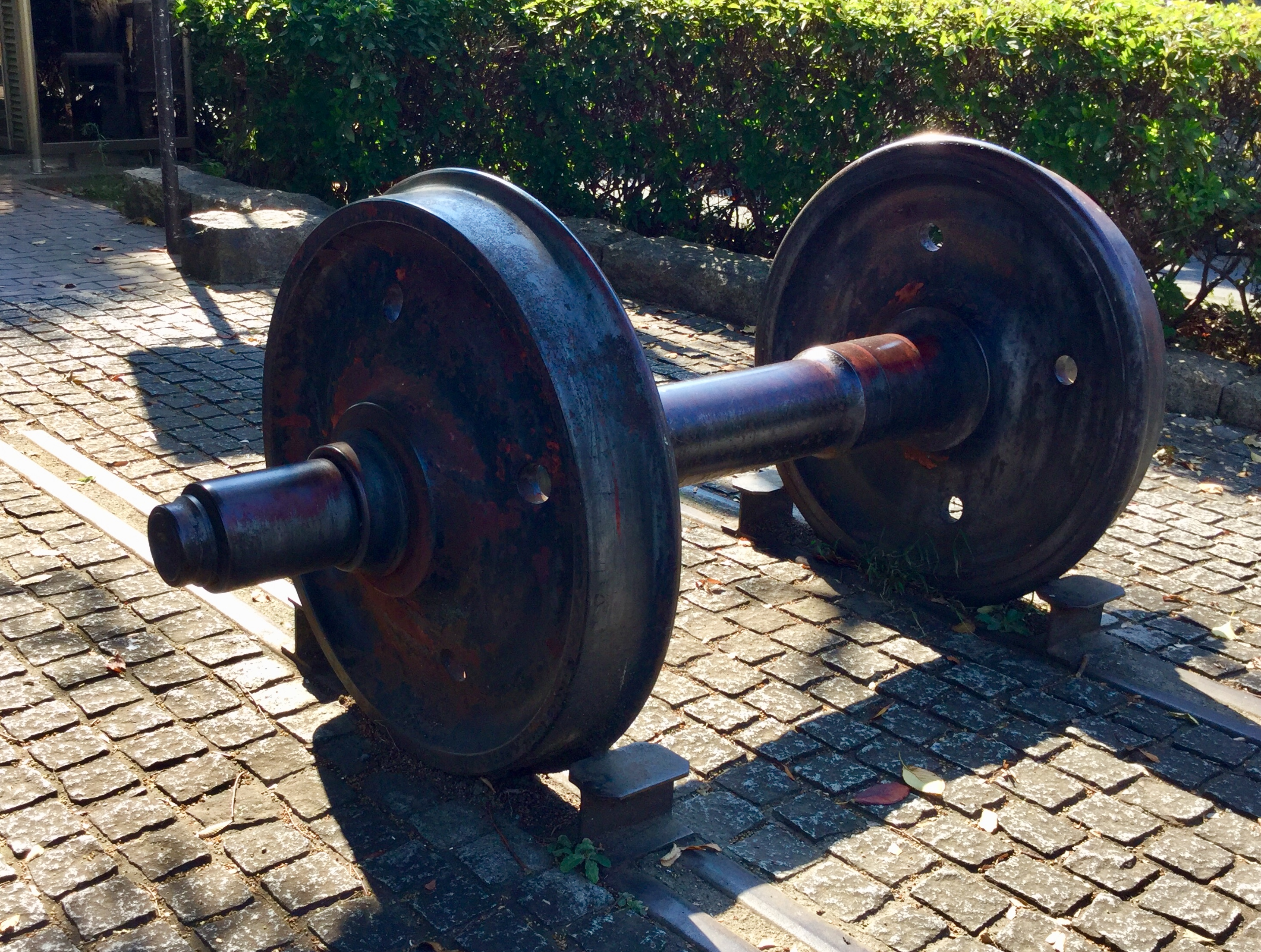 一之宮公園(神奈川県)にある車輪